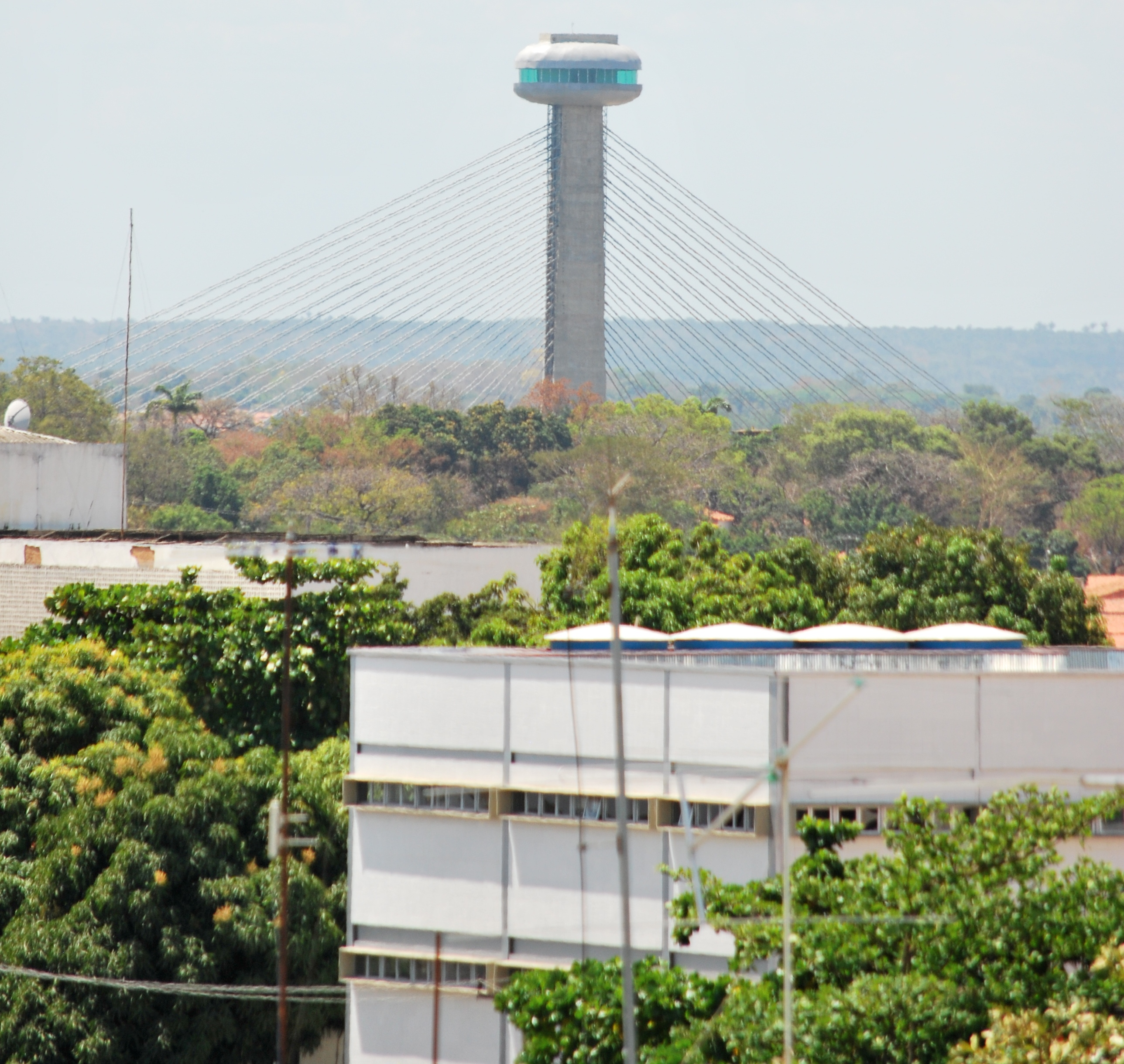 Vista do mirante da Ponte do "Sesquicentenário" João Isidoro França, em Teresina, Piauí, Brasil.